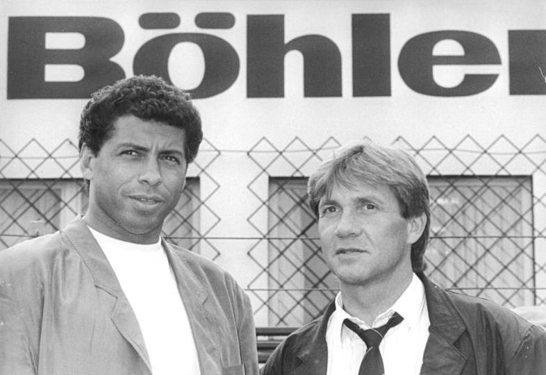 ADN-Kluge-5.5.90-Leipzig: Jimmy Hartwig (l) wird der erste Trainer aus der Bundesrepublik in der DDR-Fussball-Oberliga sein. Der 35jährige, der selbst 163 Bundesligaspieler für den Hamburger SV und Köln sowie 14 Länderspiele bestritt, unterschrieb für die kommende Saison einen Vertrag beim Aufsteiger Chemie Böhlen. Der bisherige Trainer Achim Steffens (r) wird ihm assistieren.